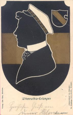 Couleur-Bild der Uttenruthia